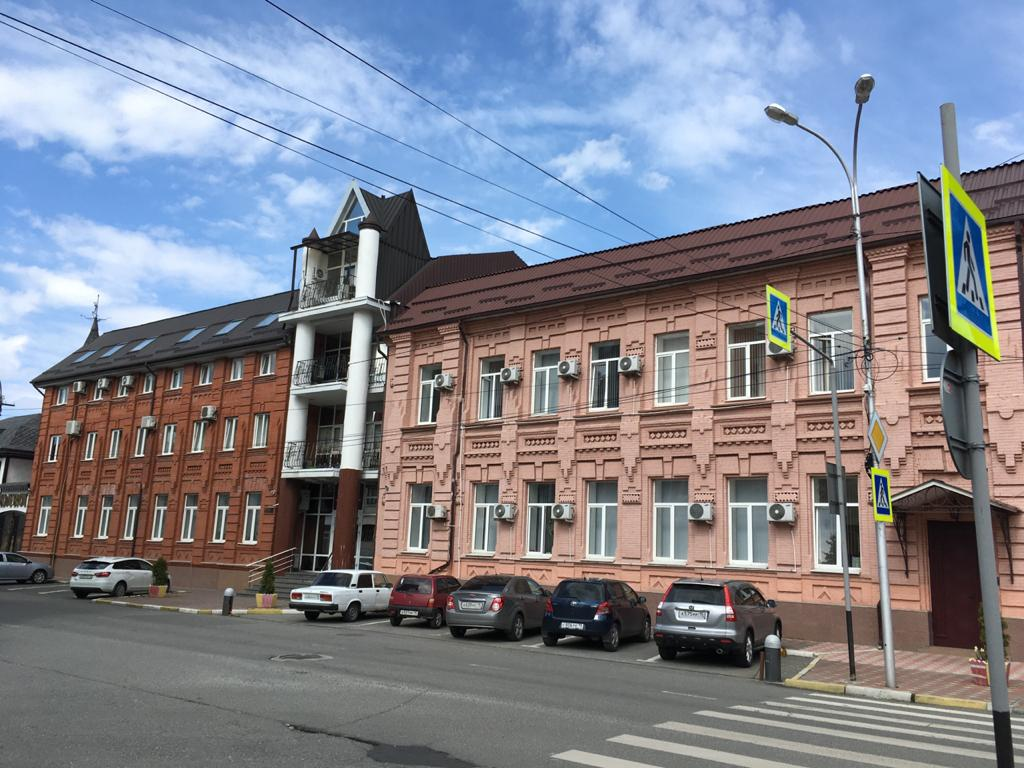 Памятник архитектуры: улица Коцоева, 24, Владикавказ, Северная Осетия